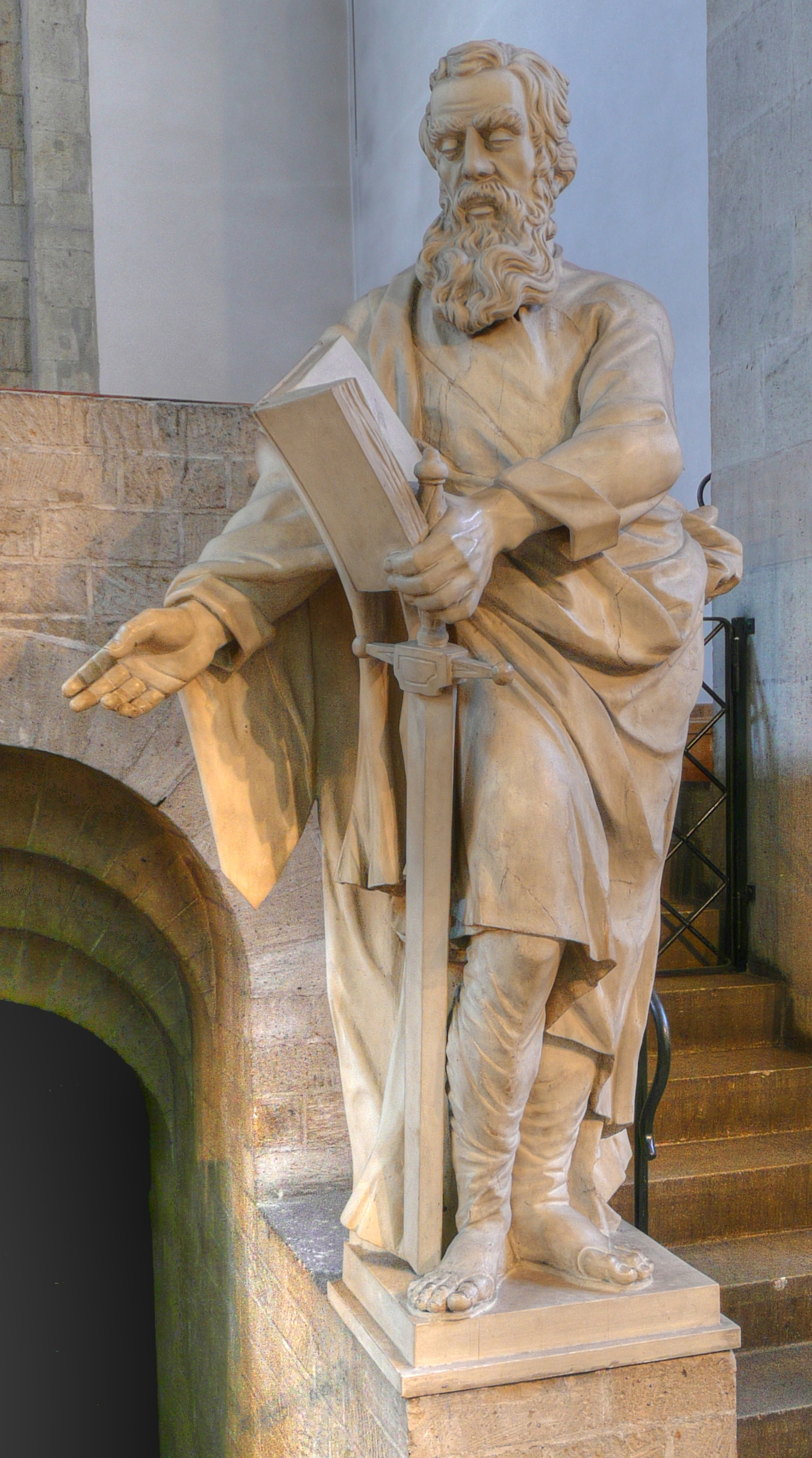 Statue des Apostels Paulus in der Kölner Kirche St. Aposteln)